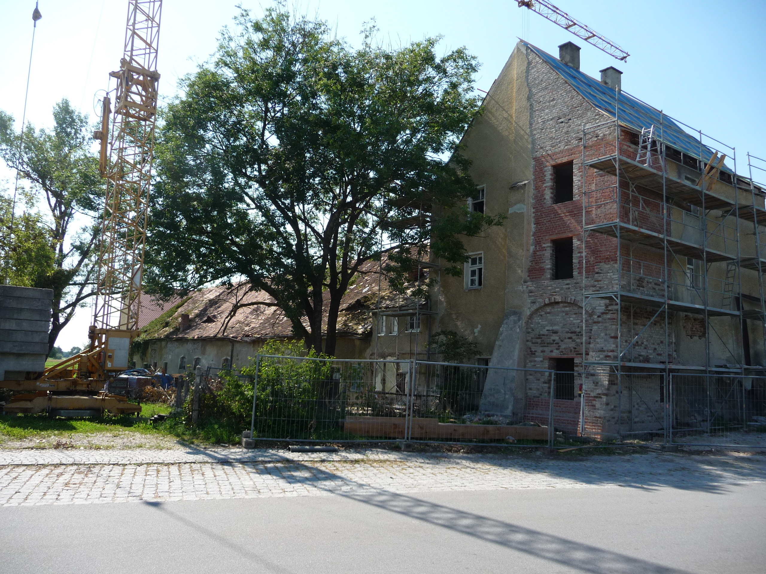 Denkmale in Aholming